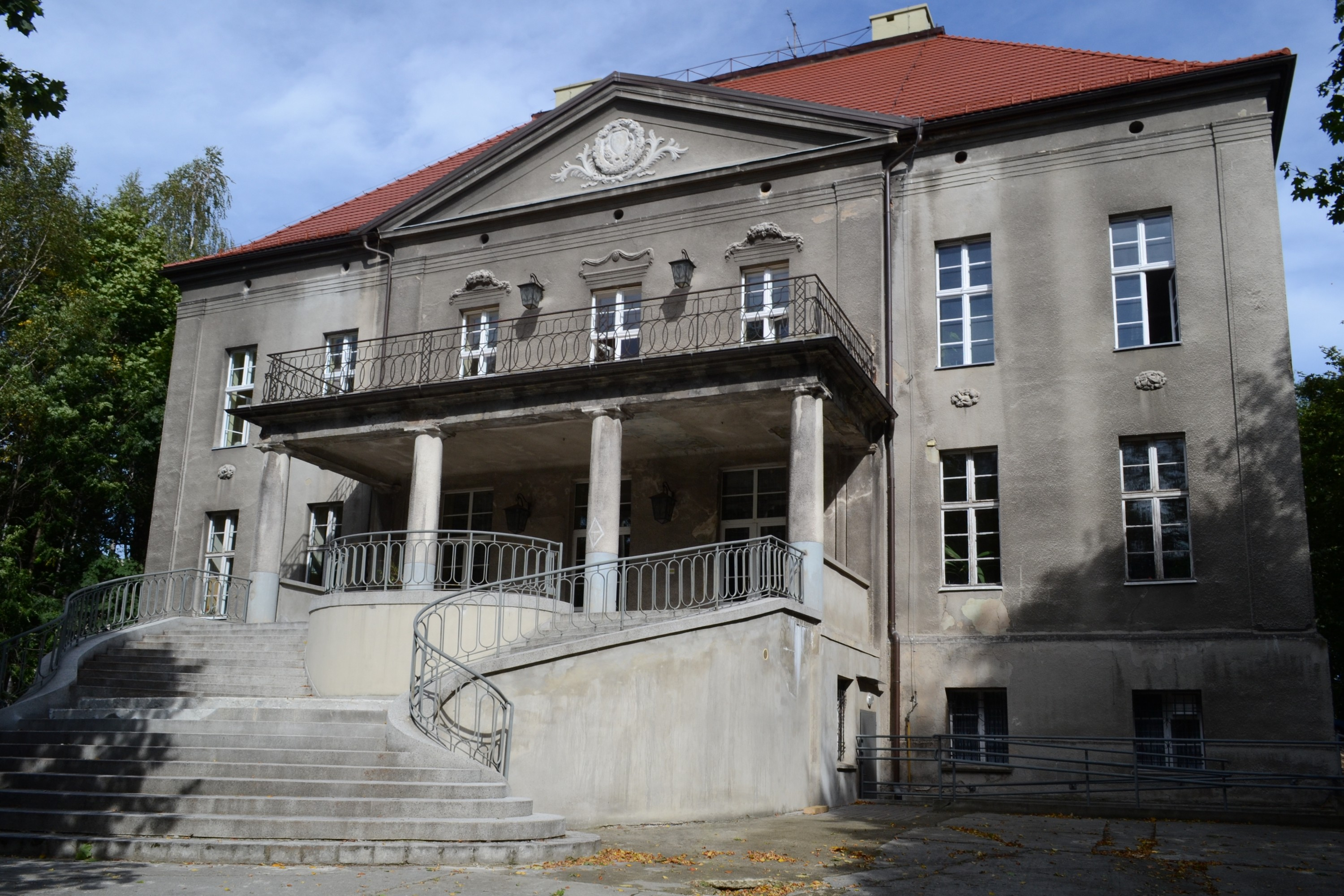 Pałac z XIXw. Gorzyce, ul. Zamkowa, Gorzyce